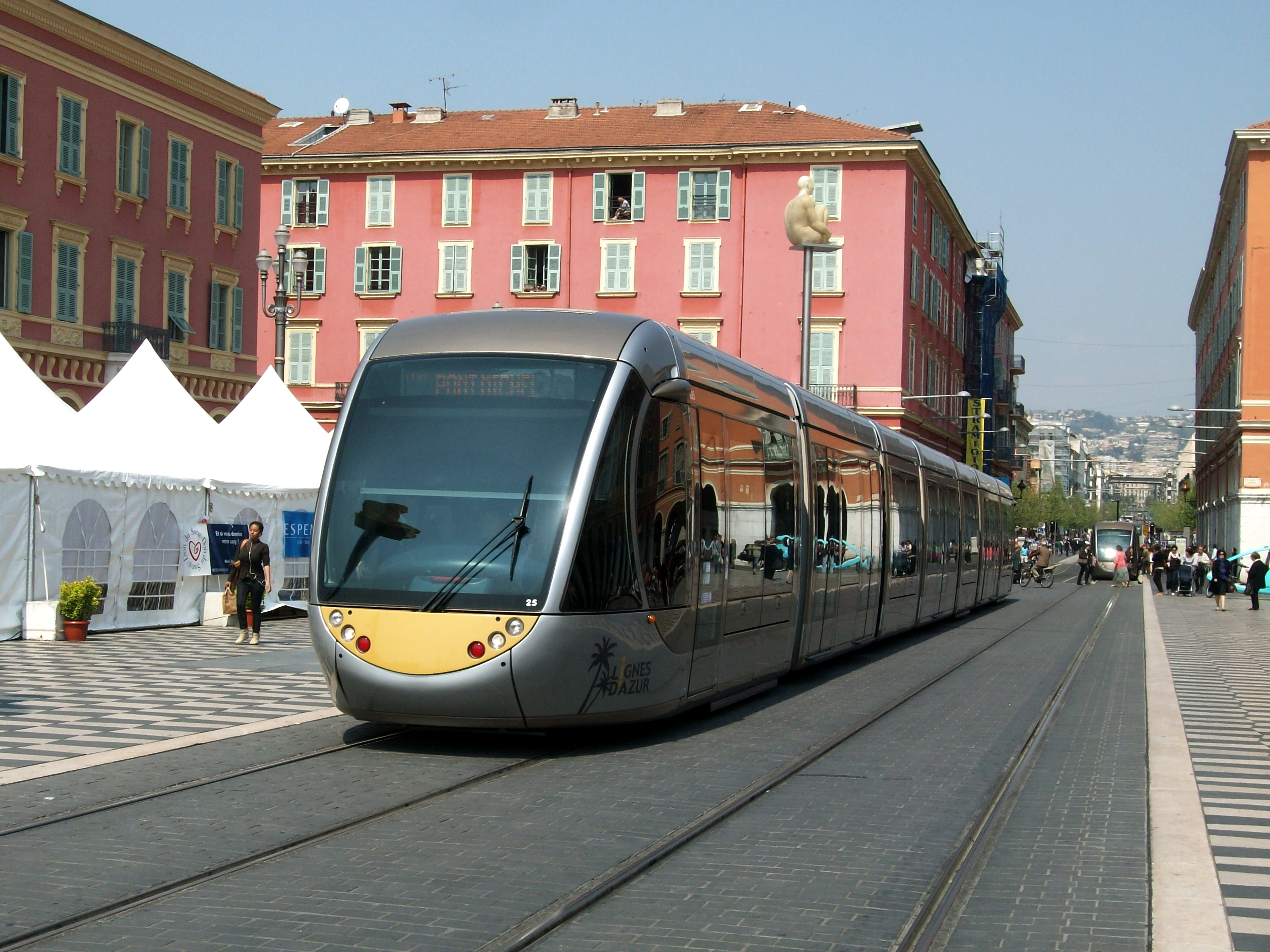 Rame de tramway Alstom Citadis 402 à Nice